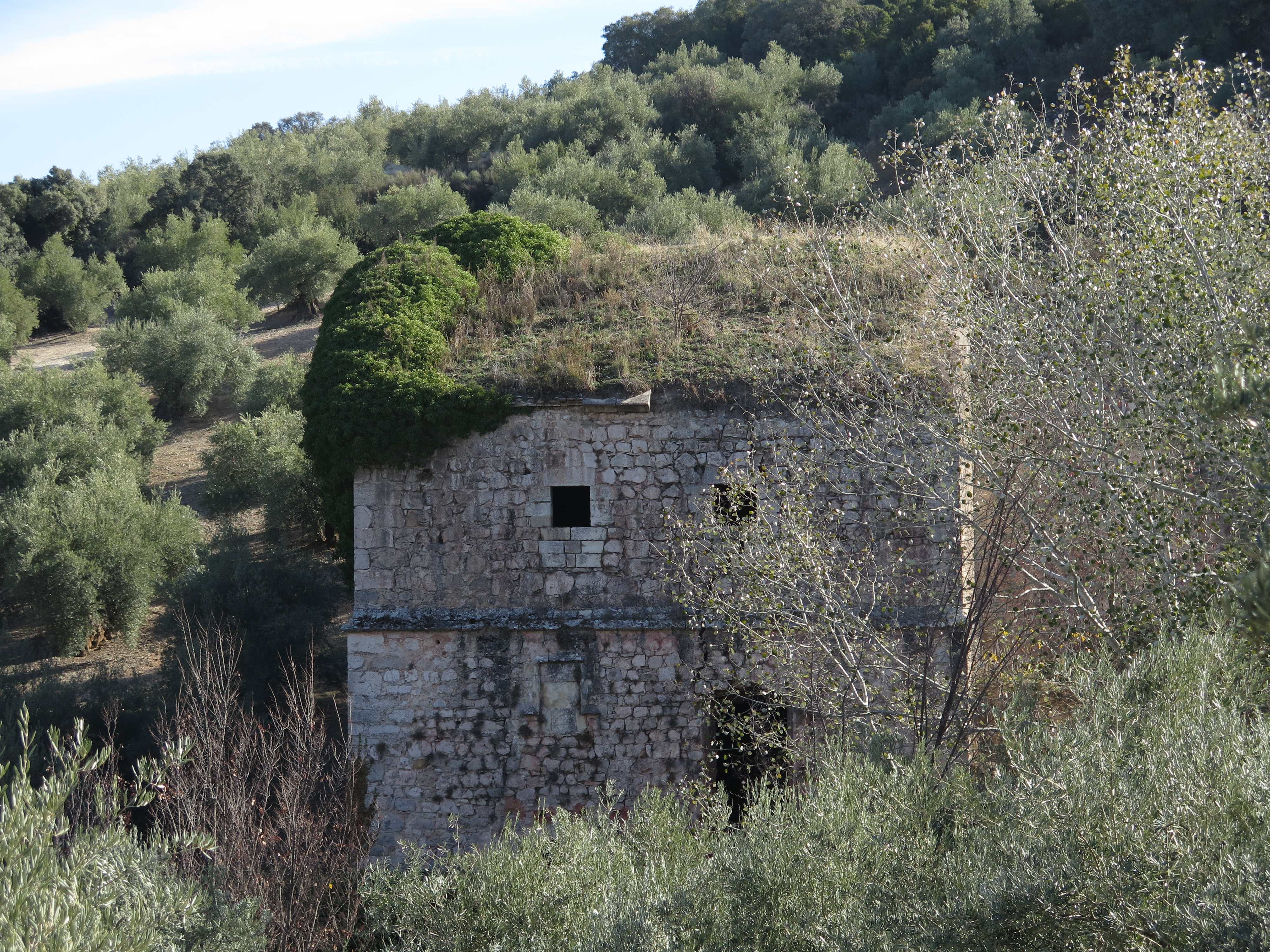 Vista frontal del Molino del Cubo.